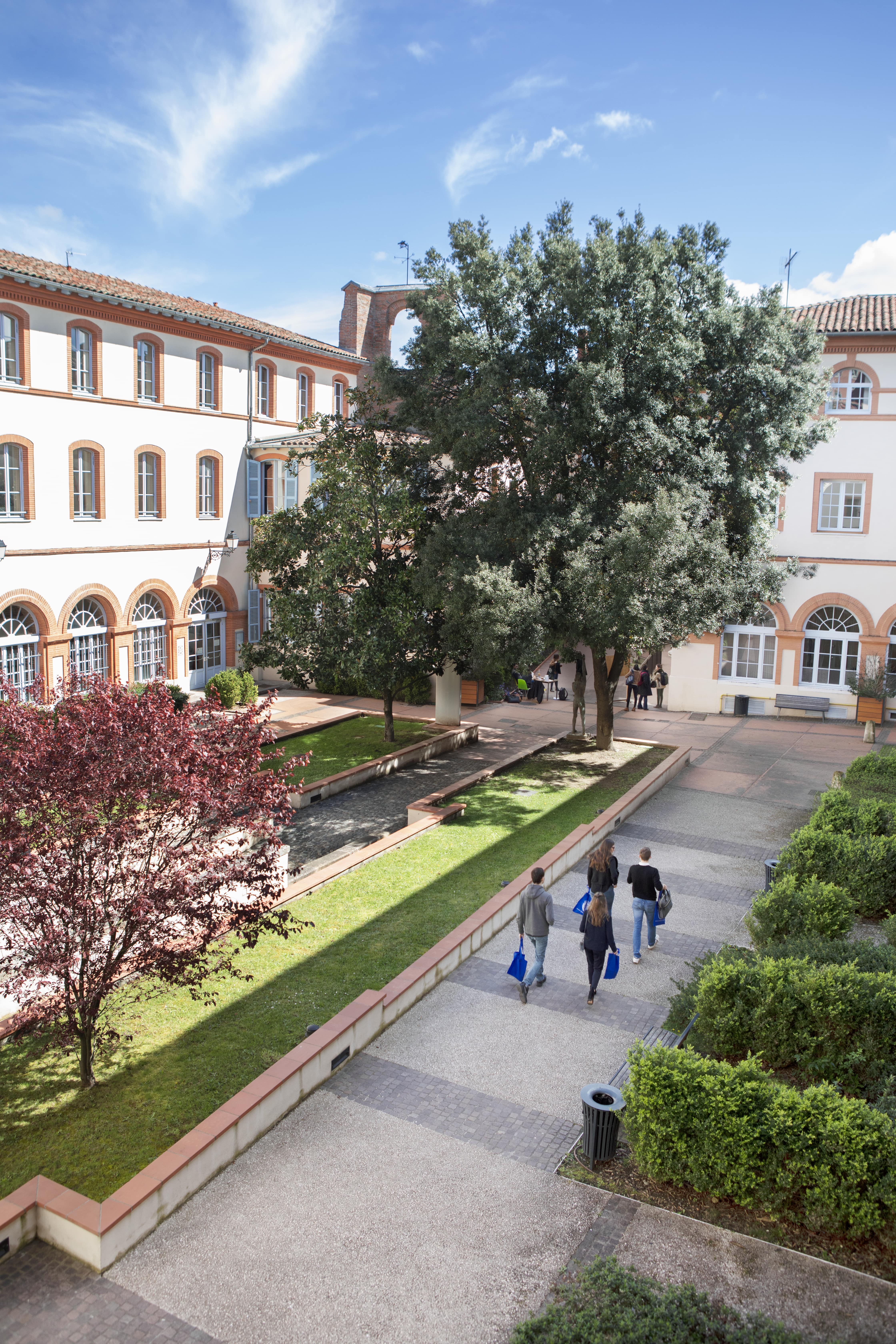 Intérieur de rue de la Fonderie